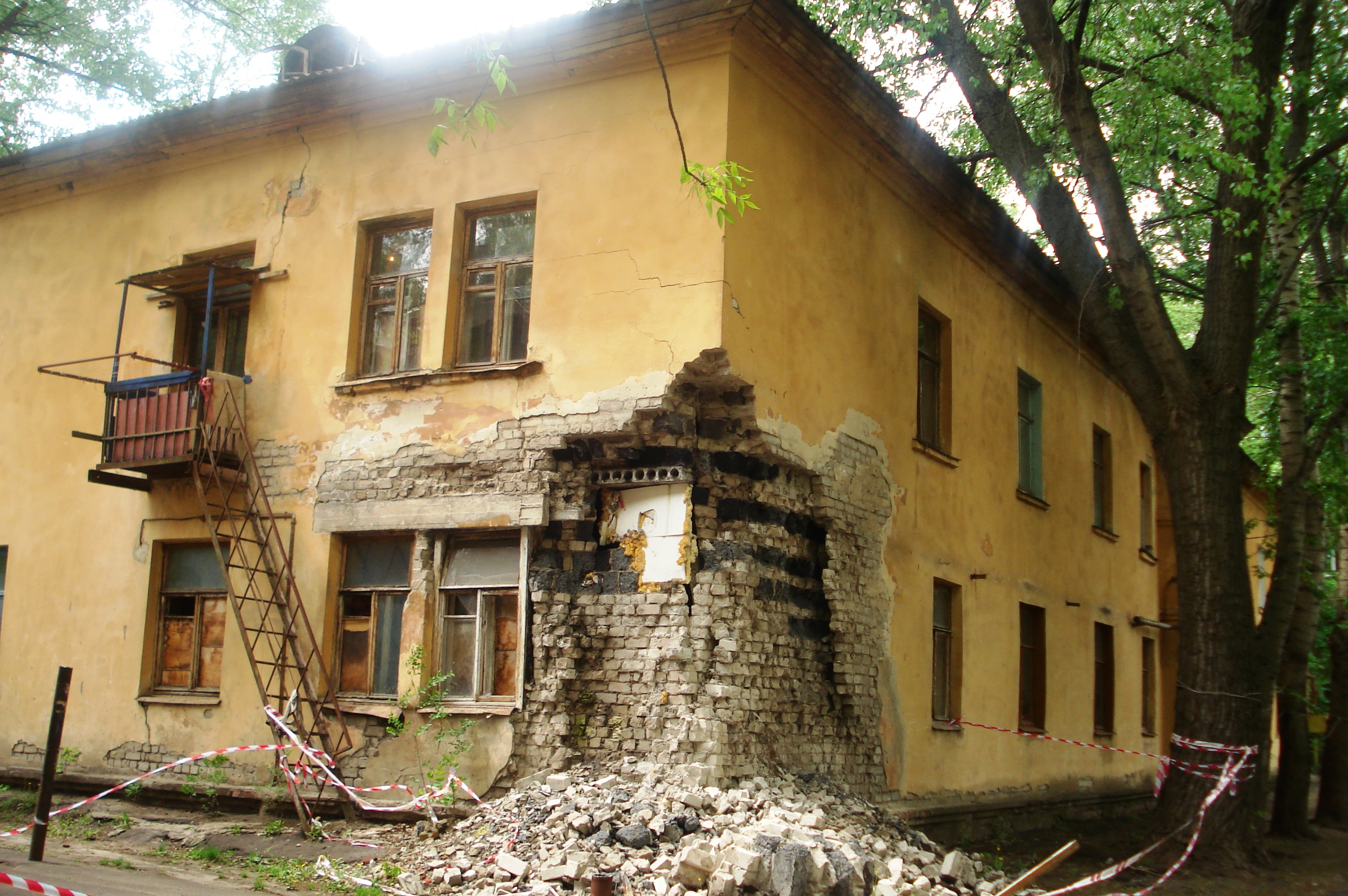 Аварийно-опасный дом по улице Ленинградской, 58Б в Воронеже